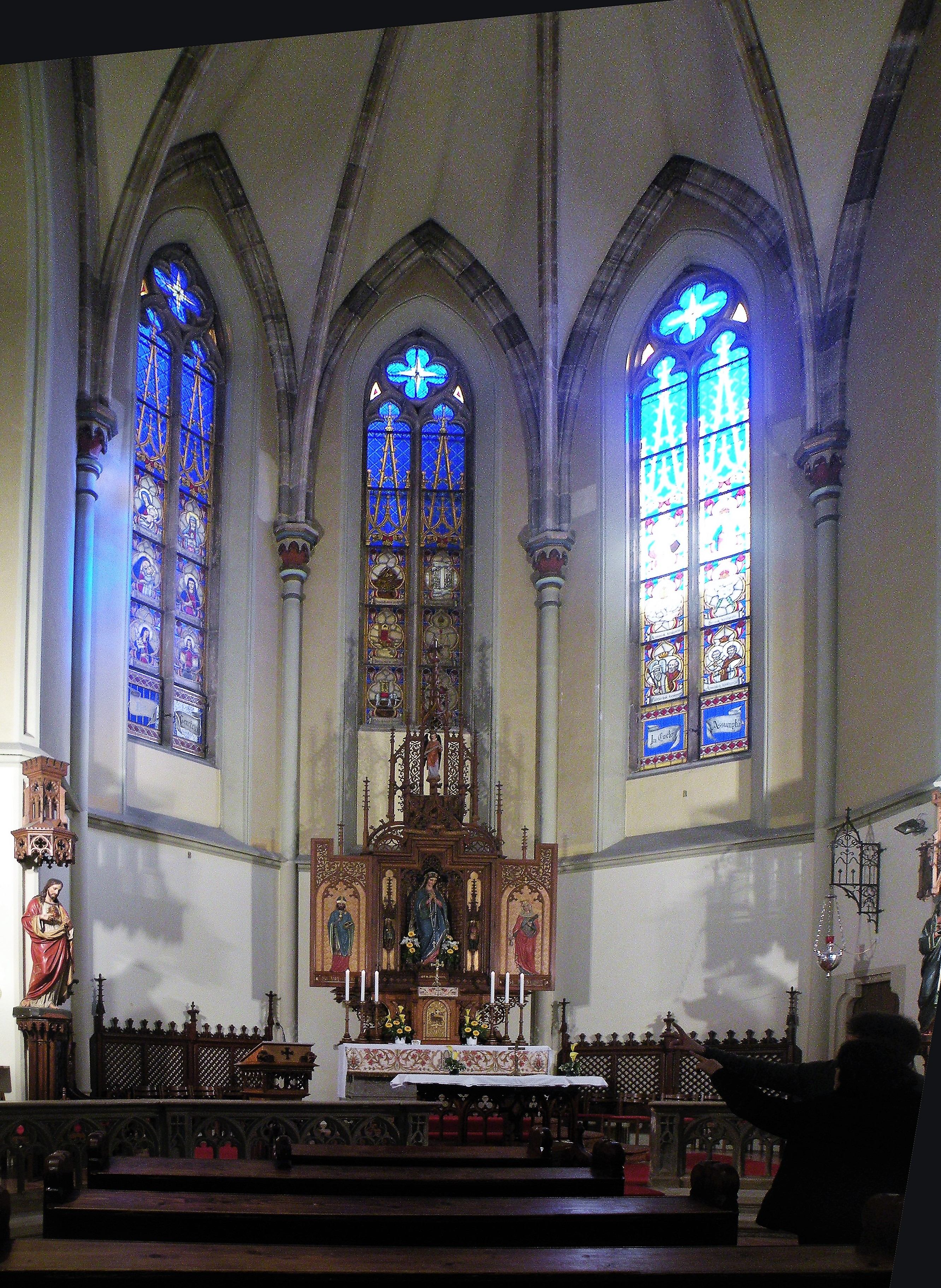 Интерьер церкви , стоящей в конце Новой улицы.